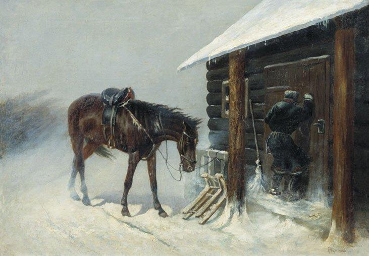 Н. С. Самокиш, "На постой"